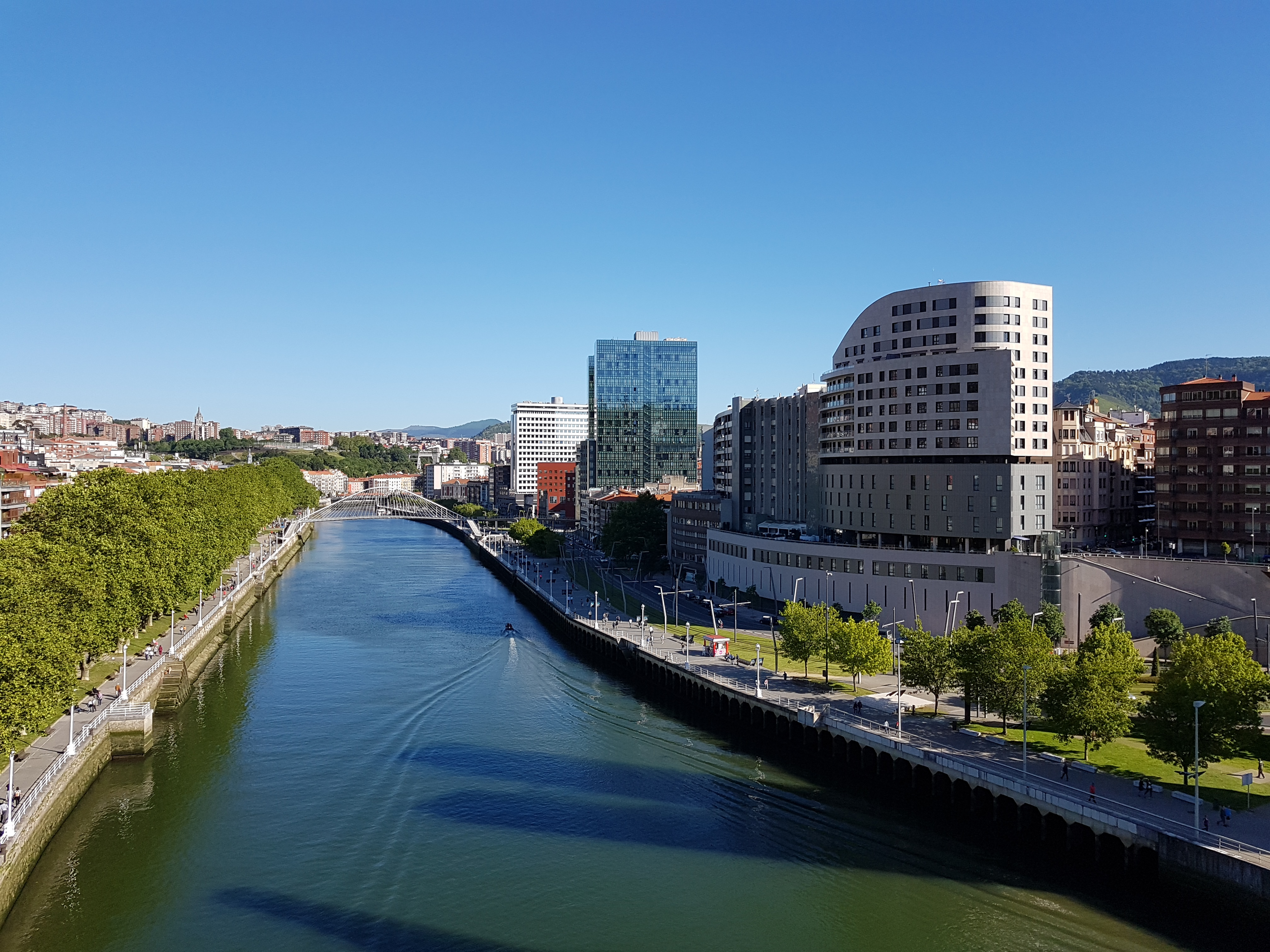 Edificio Museoalde, 13 de mayo de 2019.